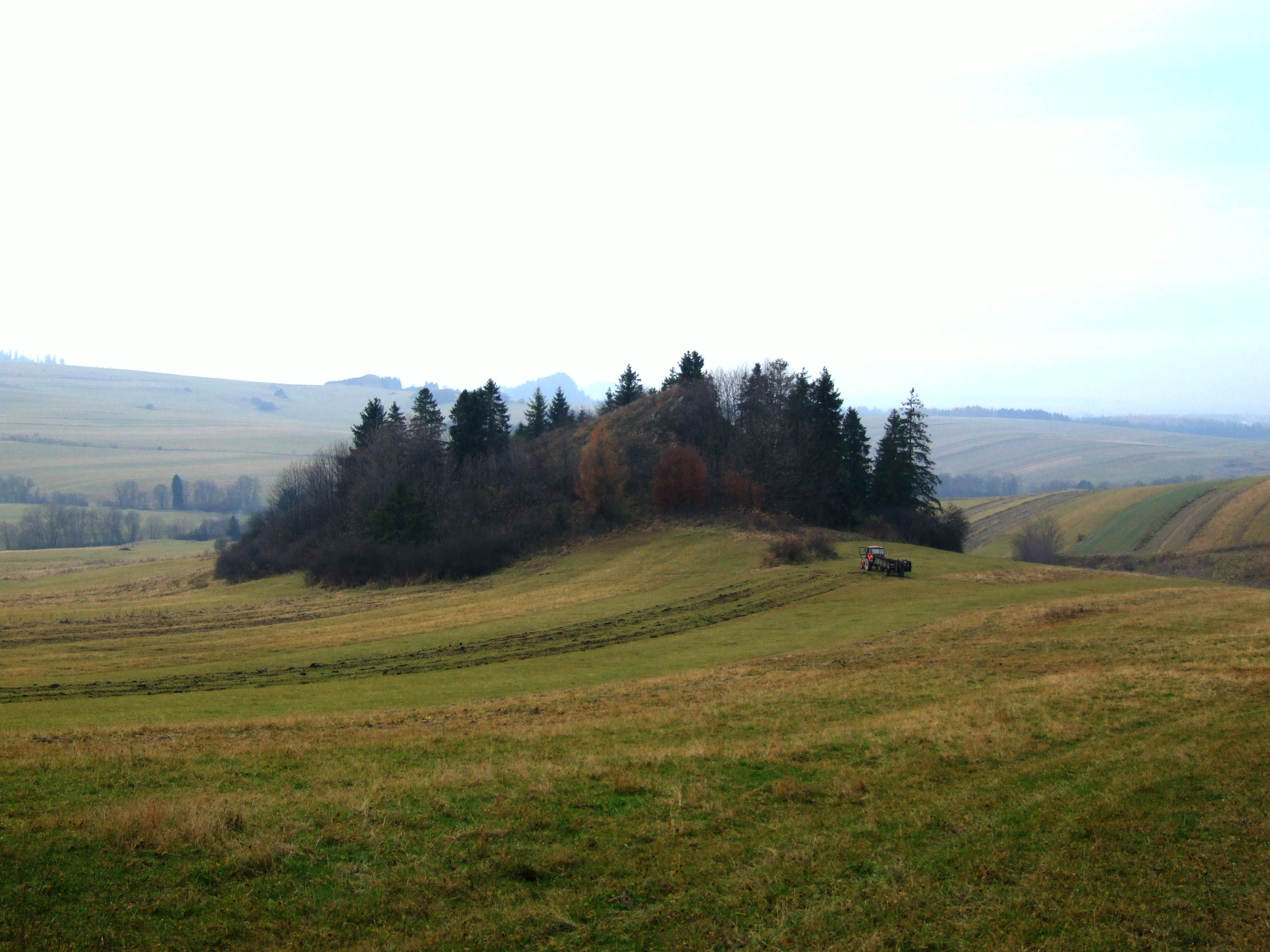 Borsukowa Skała w Dursztyńskich Skałkach